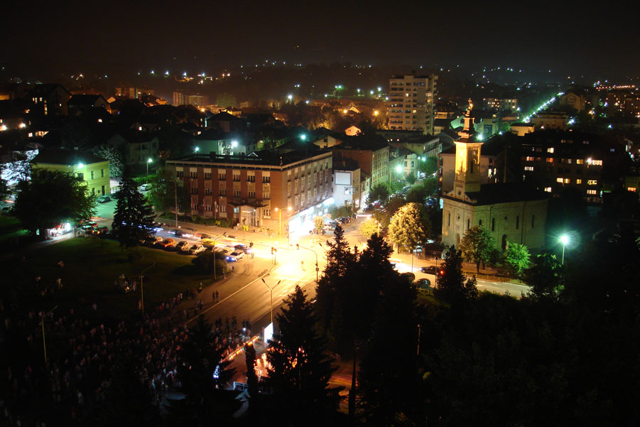 Поглед на Горњи Милановац ноћу.